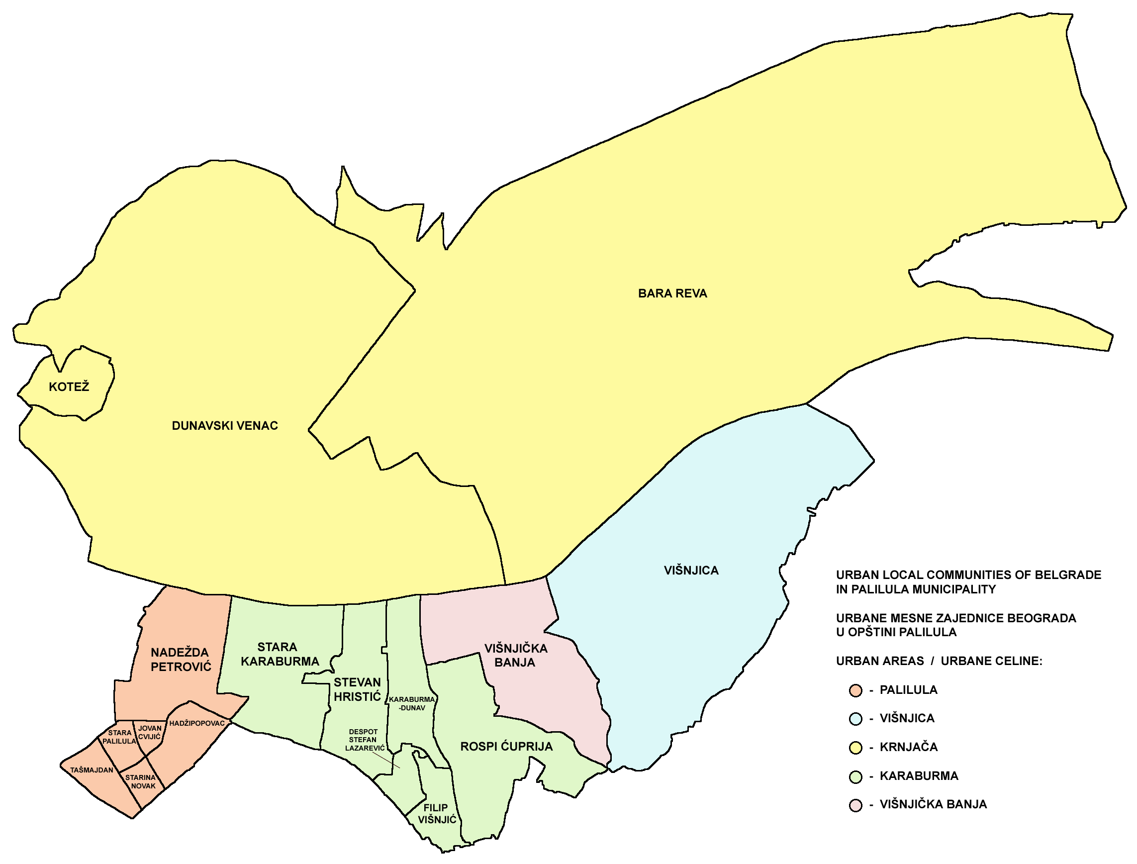 Urban local communities of Belgrade in Palilula municipality. Urbane mesne zajednice Beograda u opštini Palilula.